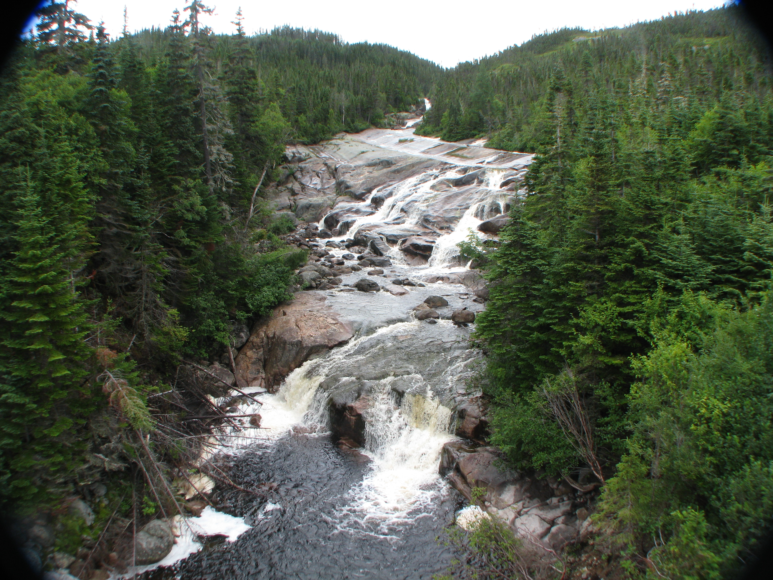 Rivière au Sault-Plat près de Rivière-au-Tonnerre en Minganie sur la Côte-Nord au Québec